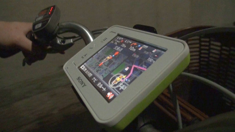 自転車用モードを備えたポータブルナビ